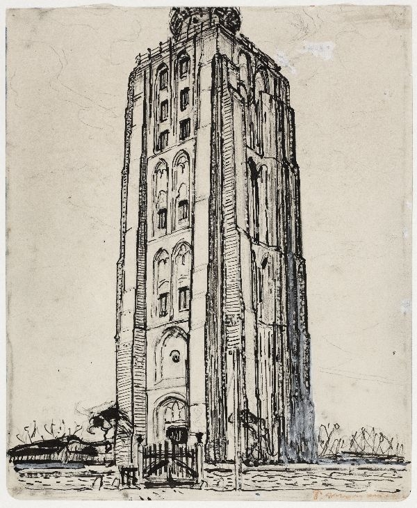 1909 hoogte 30 cm breedte 24,5 cm inkt, krijt en gouache op papier Gemeentemuseum Den Haag: 0631565